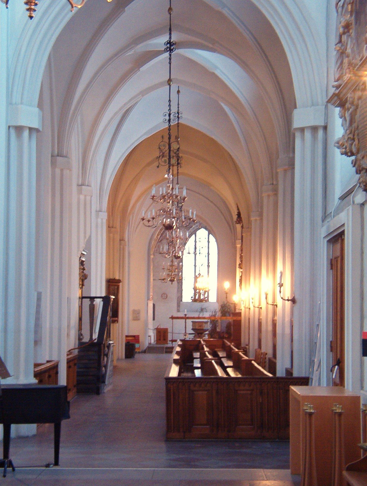 Sankt Petri kyrka, Malmö, The Krämar Chapel far back in image Date: December 2005